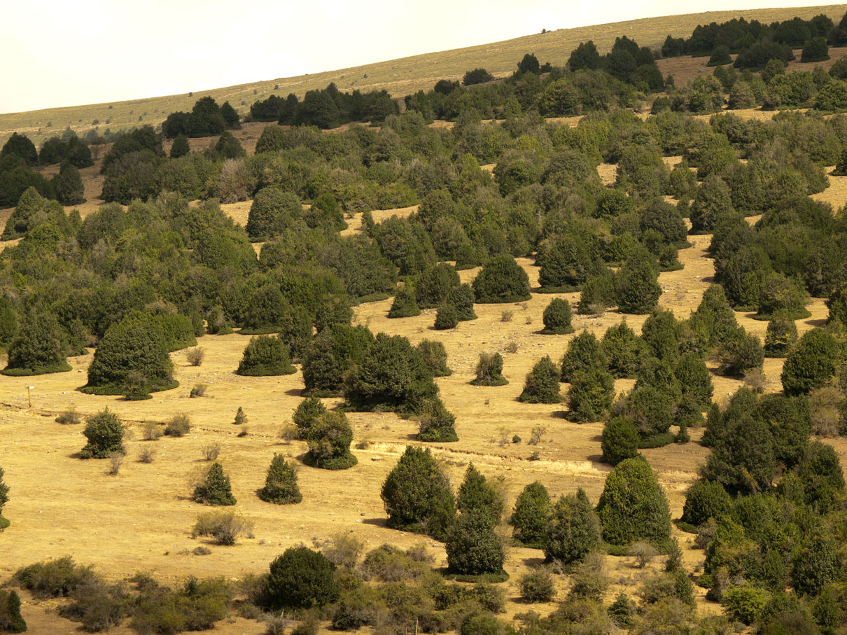 Espacio natural del acebal de Garagüeta. Arevalo de la Sierra, Torrearevalo, Soria, España